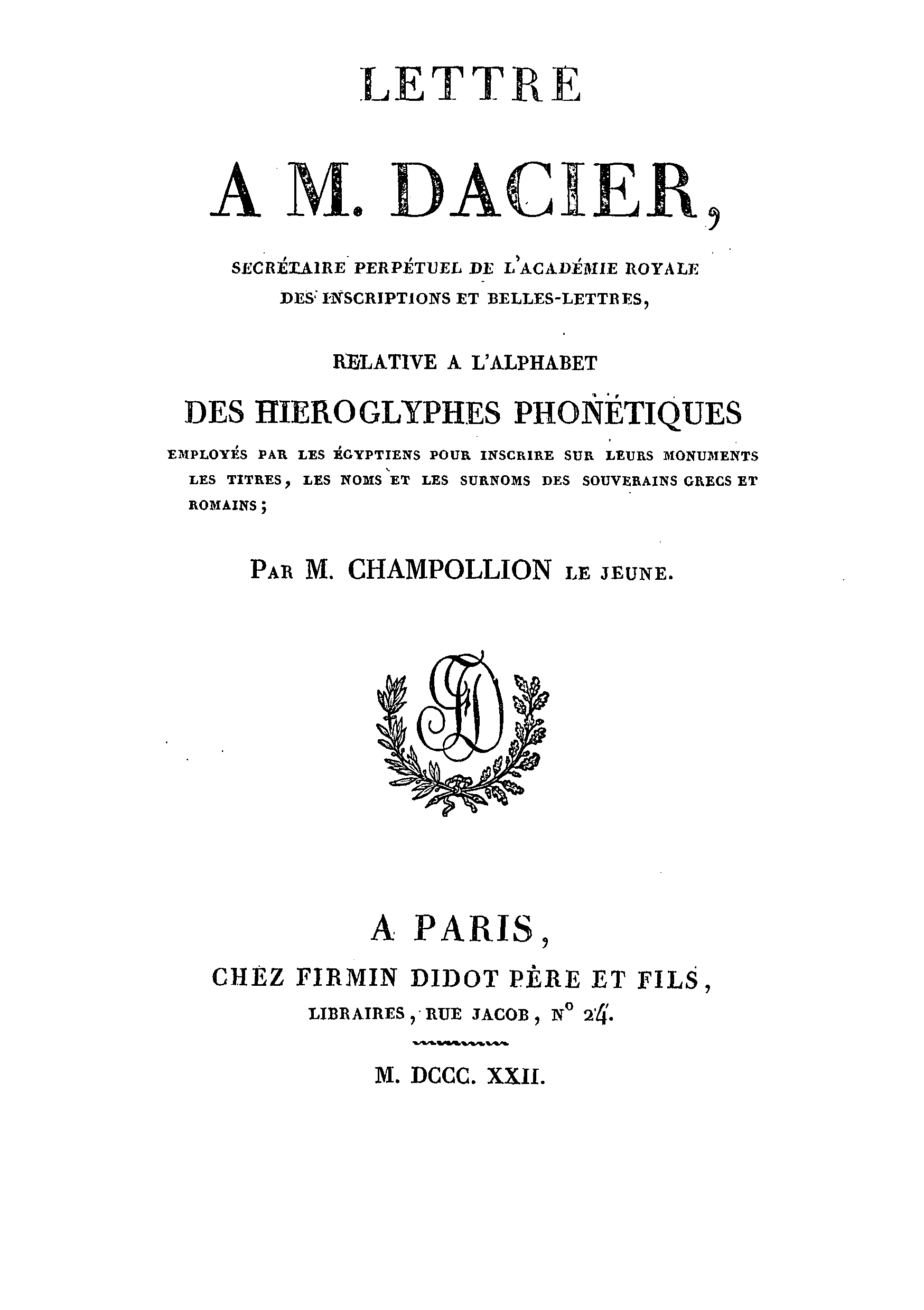 Couverture de la Lettre à M. Dacier dans son édition de 1822.